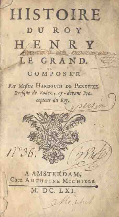 Title page of Histoire du Roy Henry le Grand by French bishop Hardouin de Péréfixe de Beaumont (1606-1671).